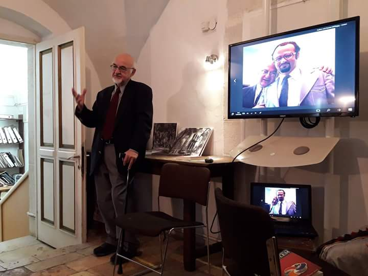 הארוט קהואג'יאן, בנו של הצלם, בערב השקת הספר במוזיאון הטבע ירושלים